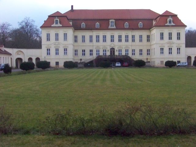 Schloss Nischwitz